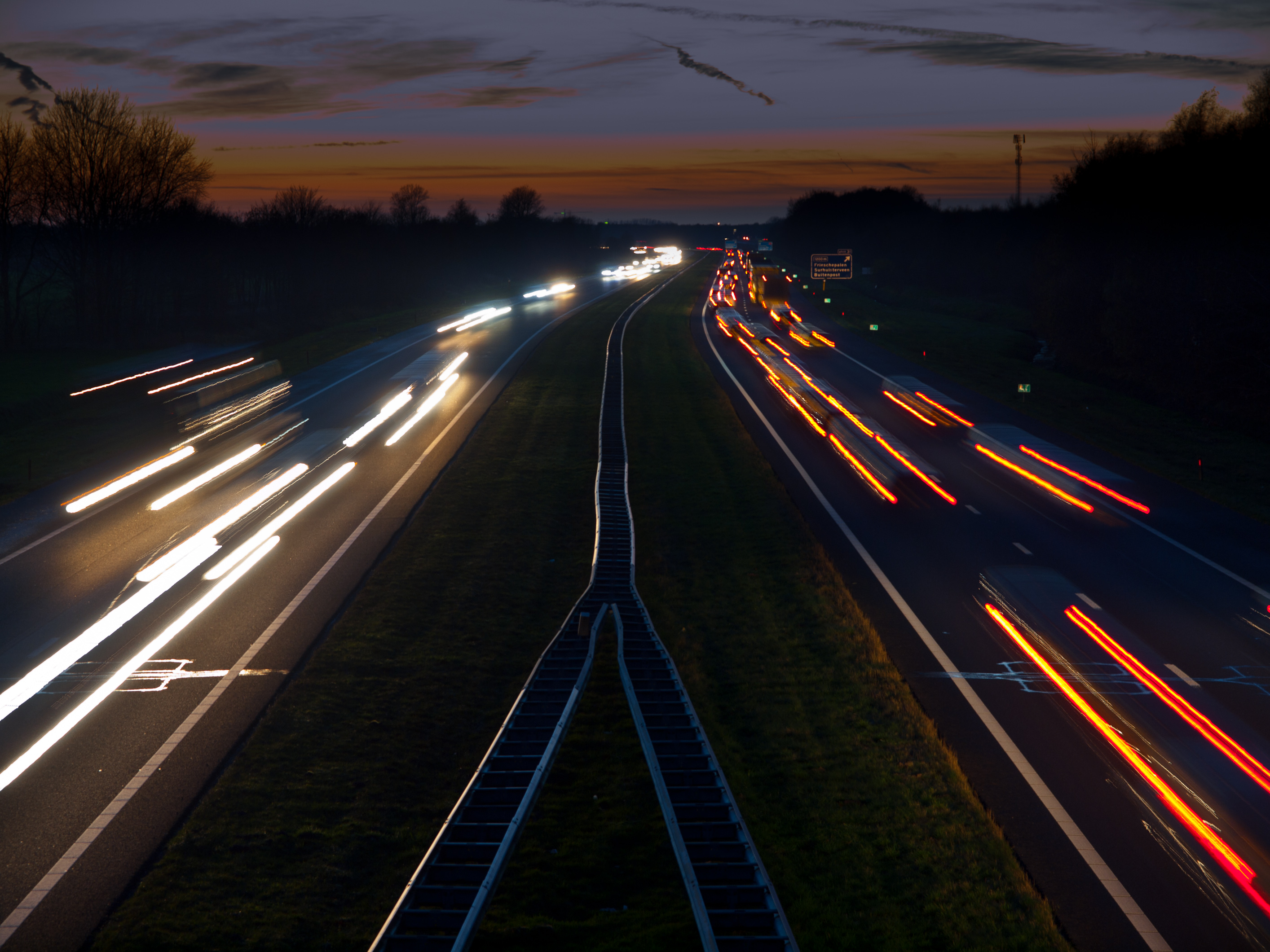 Snelweg A7 tijdens de avondspits